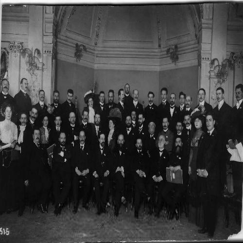 Neunter Zionistenkongress 1909 im Konzerthaus Ludwig, Millerntorplatz 1 zu Hamburg. Das Kongresspräsidium gemischt mit Gästen, v.r.n.l. vorn sitzend Se'ev Wladimir Temkin (Galizien, Österreich-Ungarn, später Paris), Samuel Pineles (Galatz), Jechiel Tschlenow (Russland), David Wolffsohn (Deutschland), Max Bodenheimer (Deutschland), Otto Warburg (Deutschland), Menachem Ussischkin (Russland), Adolph Stand (Österreich-Ungarn), zweite Reihe 7.v.r. Ernst Calmus (Vors. des Lokalvereins Hamburg der Zionistischen Organisation), 9.v.r. J. Nimrodi